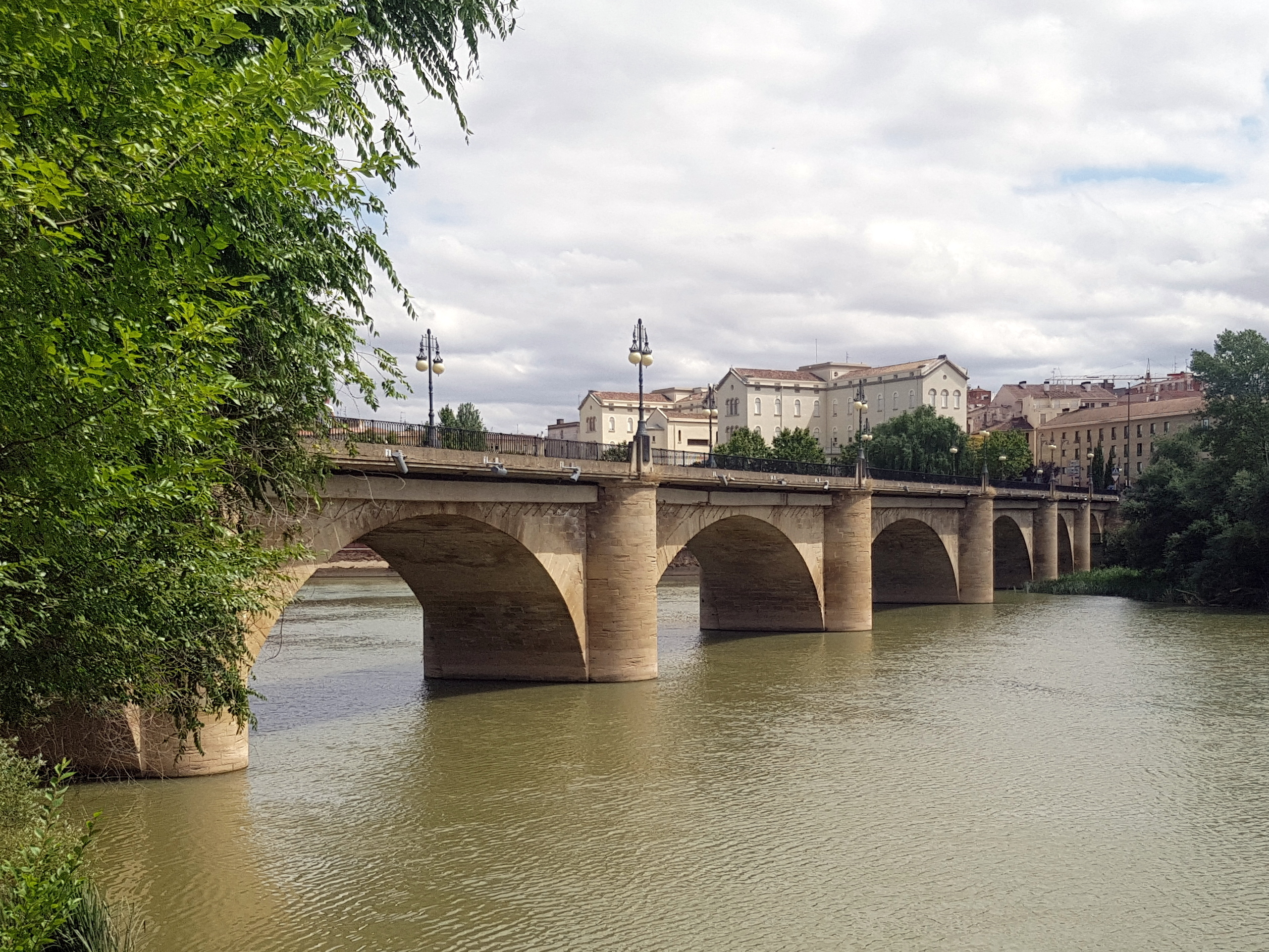 Vista del Puente de piedra de Logroño desde la margen izquierda.